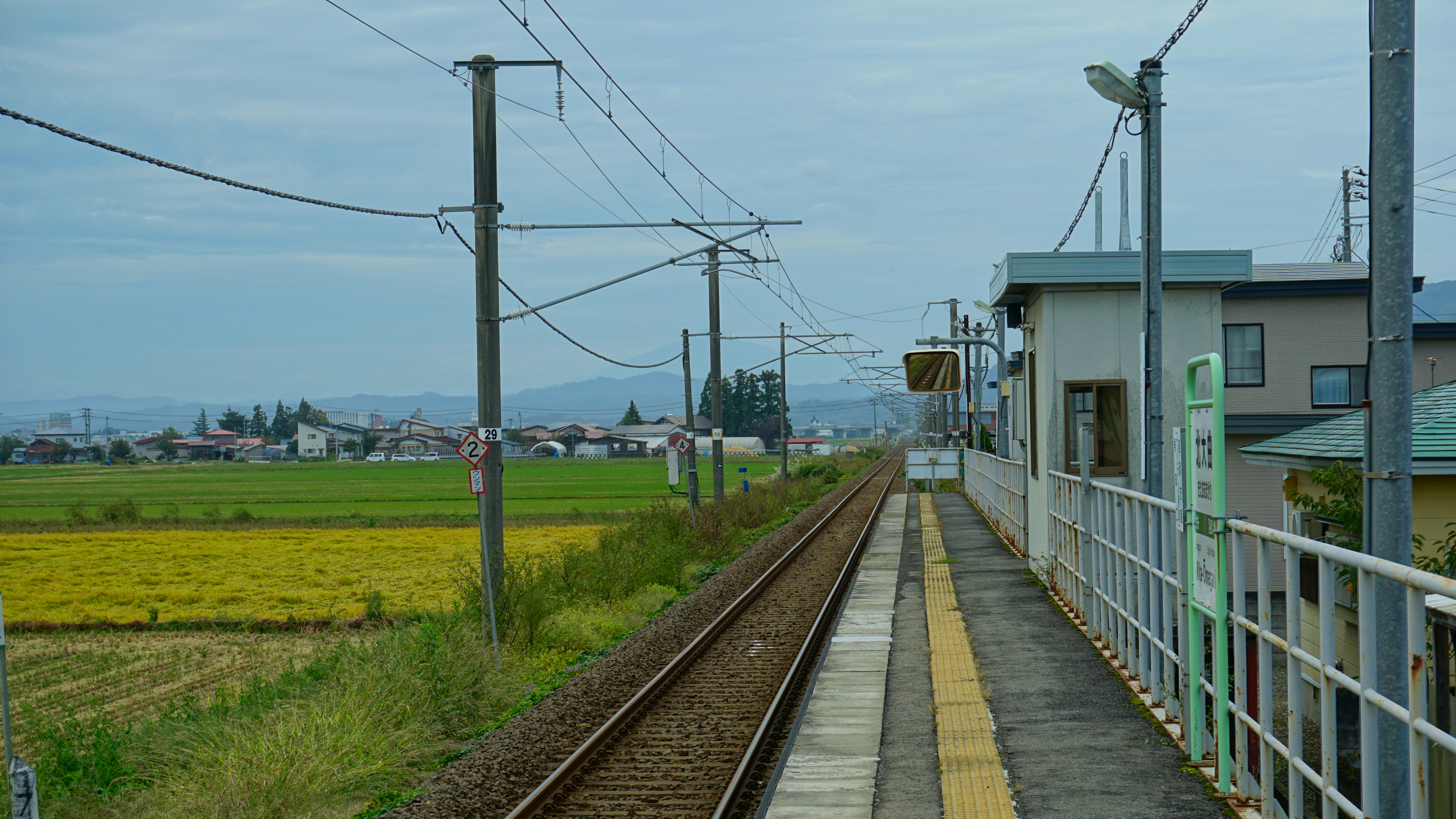 田沢湖線 北大曲駅（秋田県大仙市）